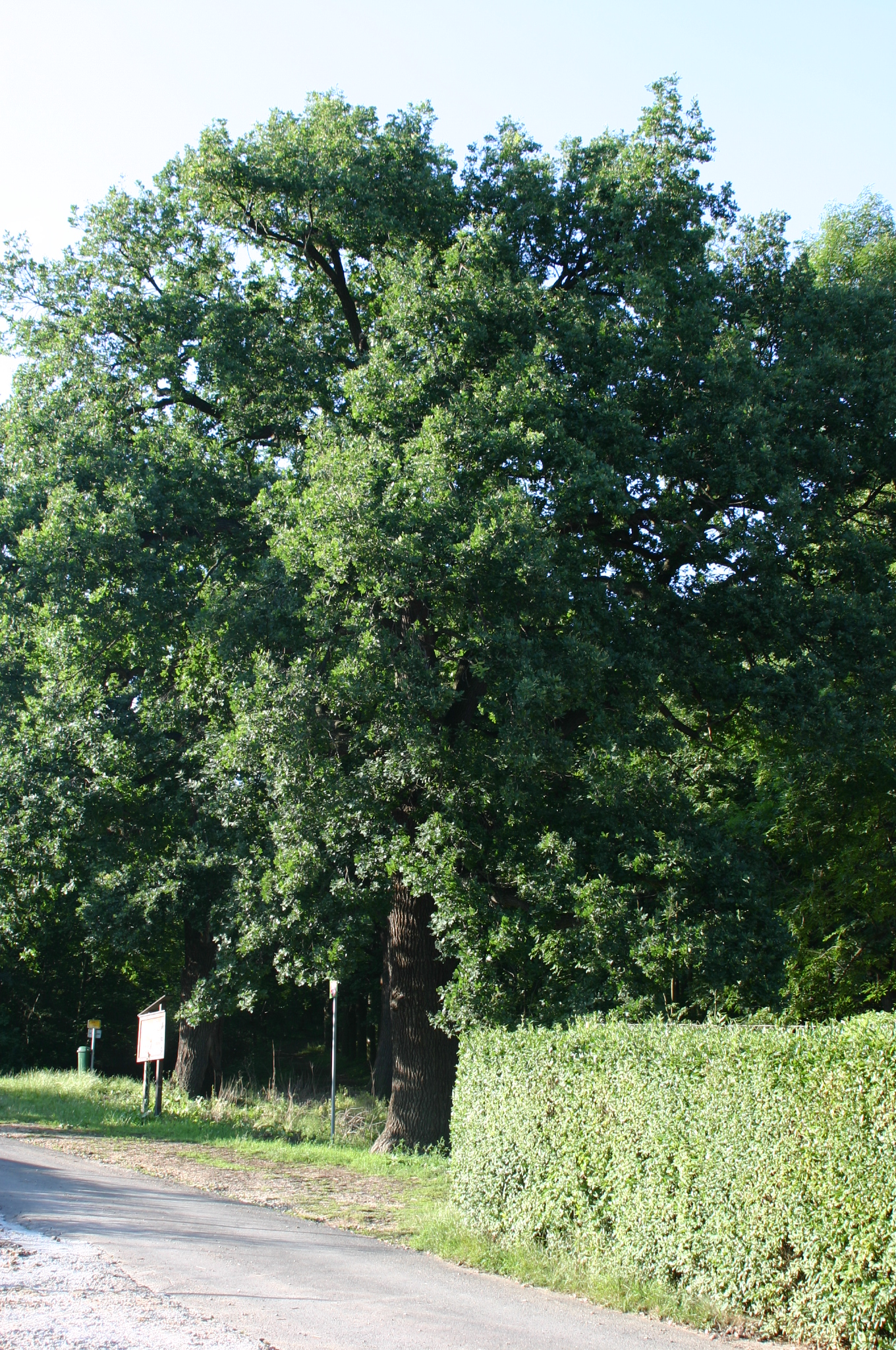 Chráněný dub pod vrchem Ressl ve městě Most.